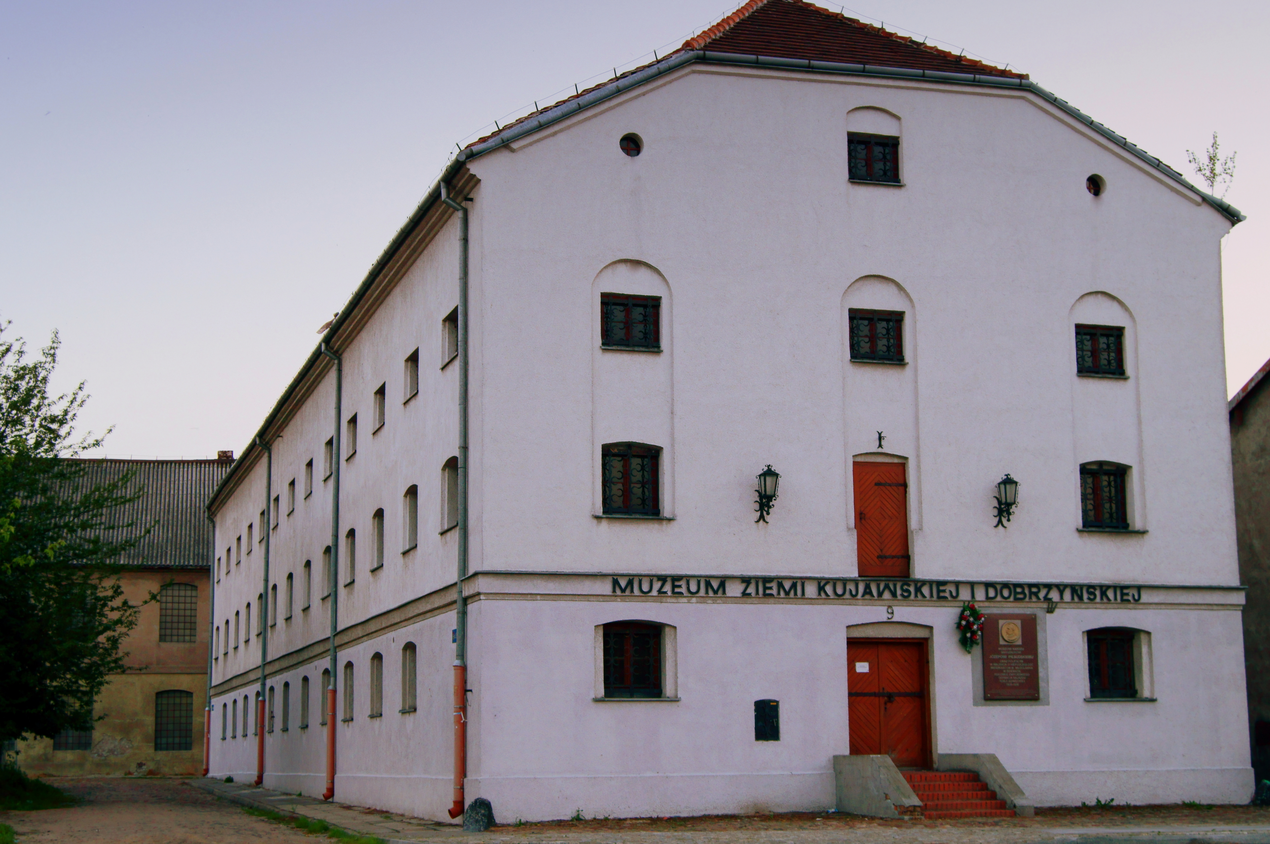 spichrz, 1842 Włocławek, ul. Bulwary Marszałka Józefa Piłsudskiego 9, miasto Włocławek